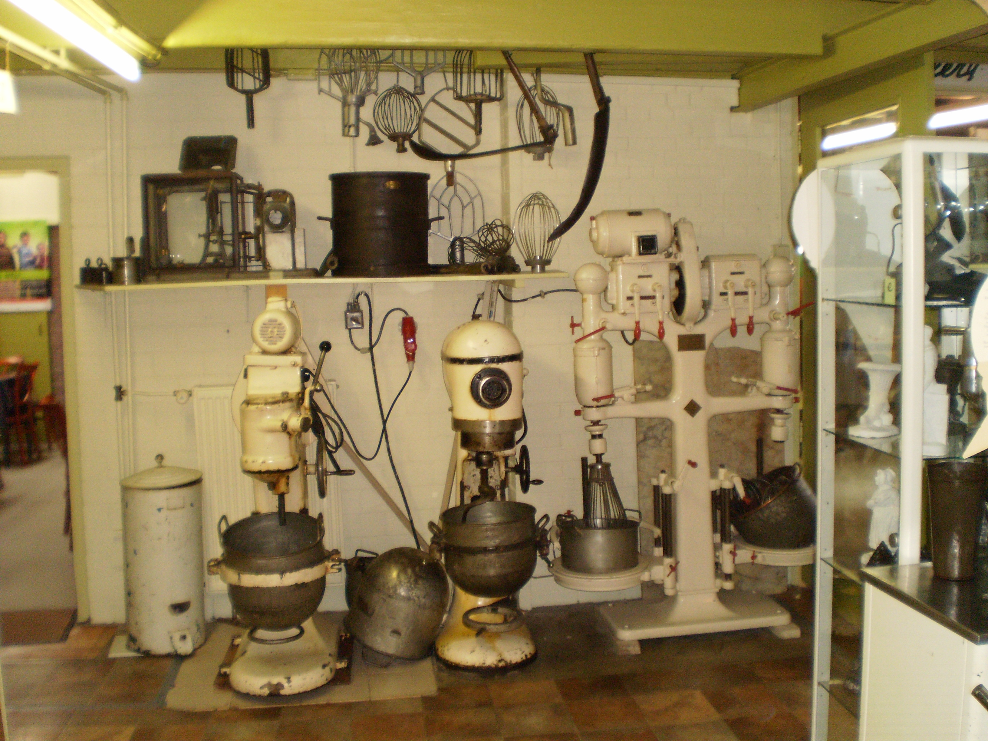 Bakkers ark bie Bakkerijmuseum De Alde Bakkerij.